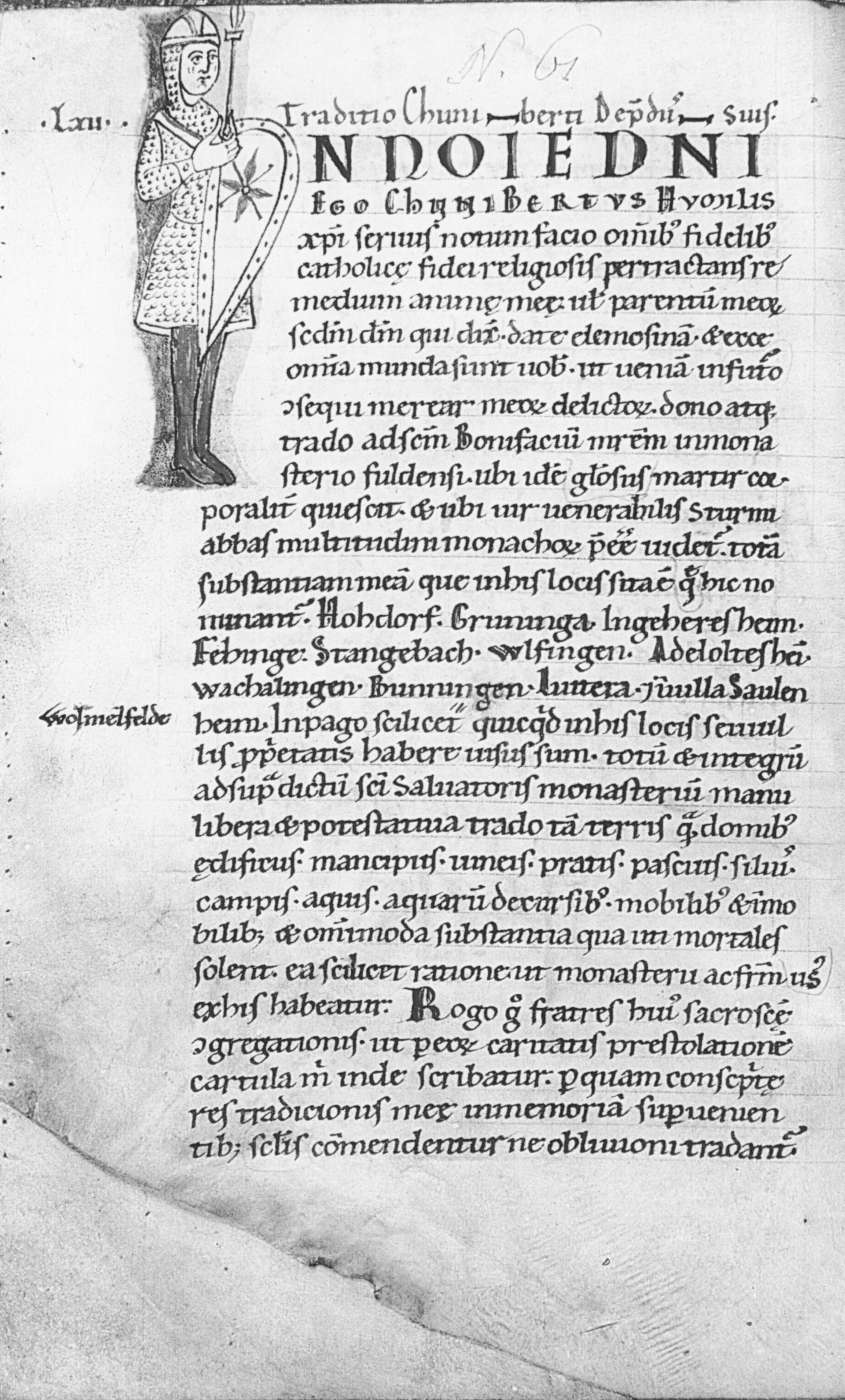 Die erste Erwähnung des Ortes Stangenbach, heute Teil der Gemeinde Wüstenrot, in einer Urkunde aus dem Jahr 779, die in Abschrift im Codex Eberhardi aus dem 12. Jahrhundert wiedergegeben ist